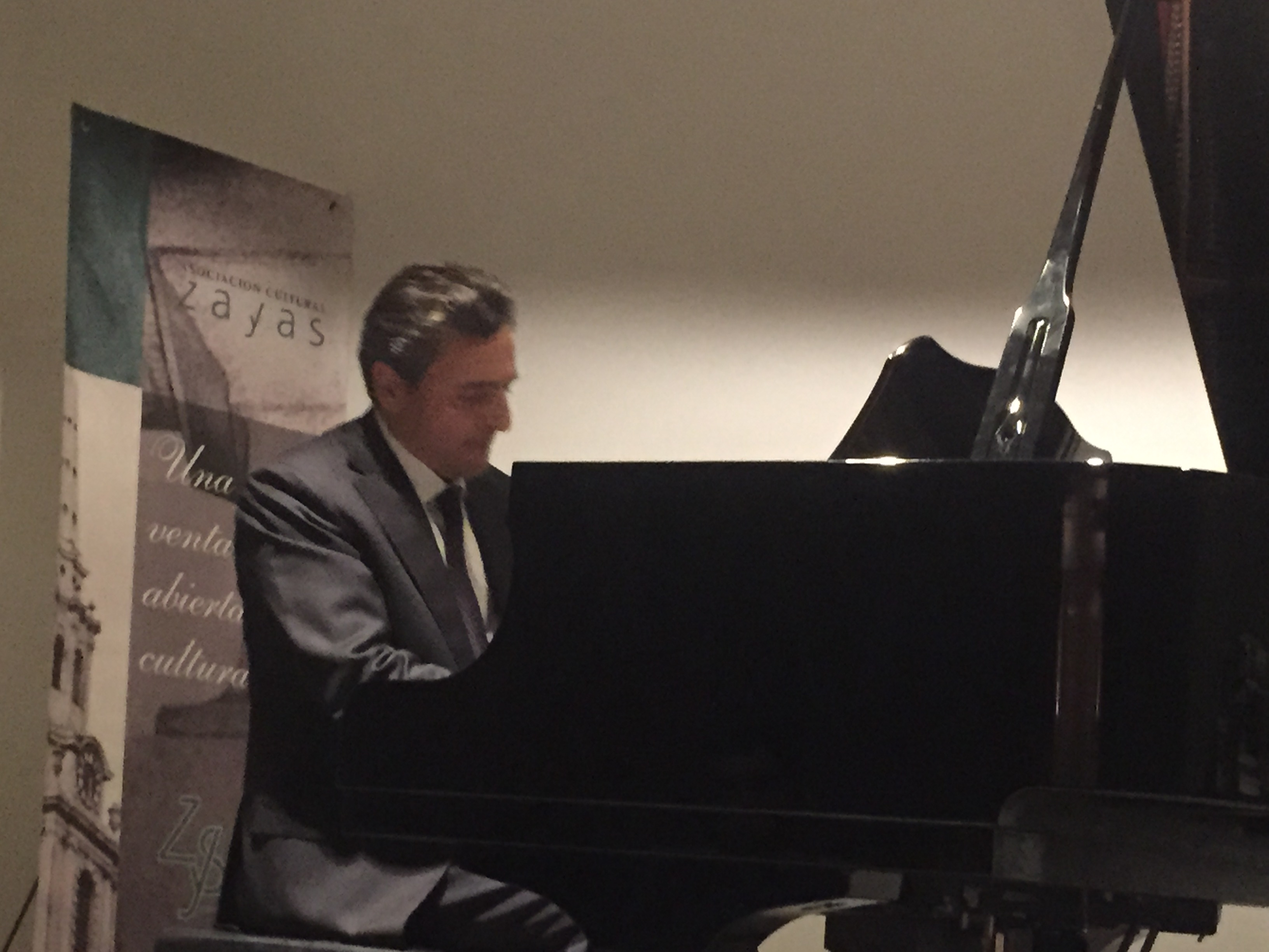 El compositor español Pedro Fuentes interpretando al piano una de sus obras durante el Concierto de Navidad 2015 de AC Zayas (Madrid).